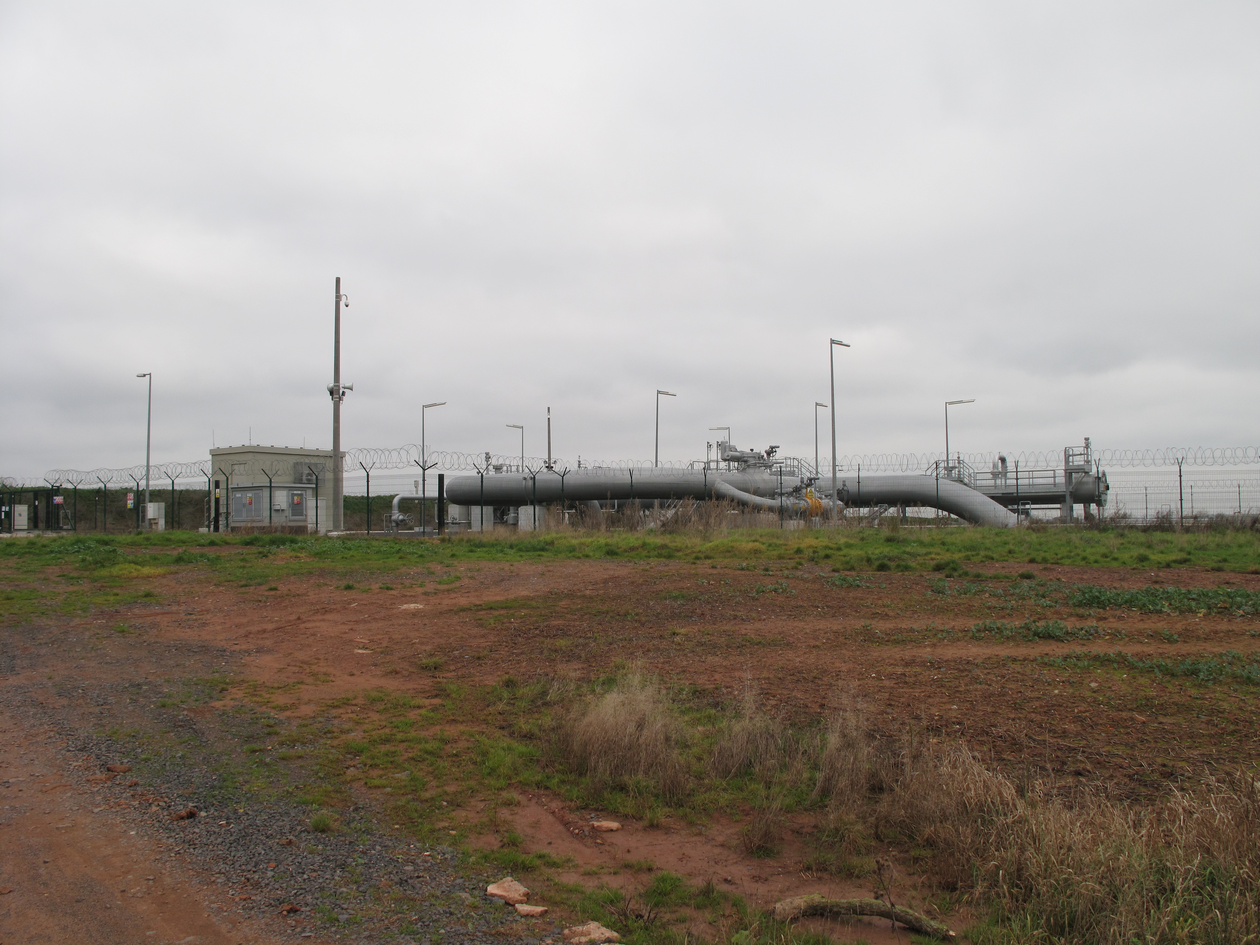 Stanice na plynovodu Gazela u Malměřic. Okres Louny, Česká republika.